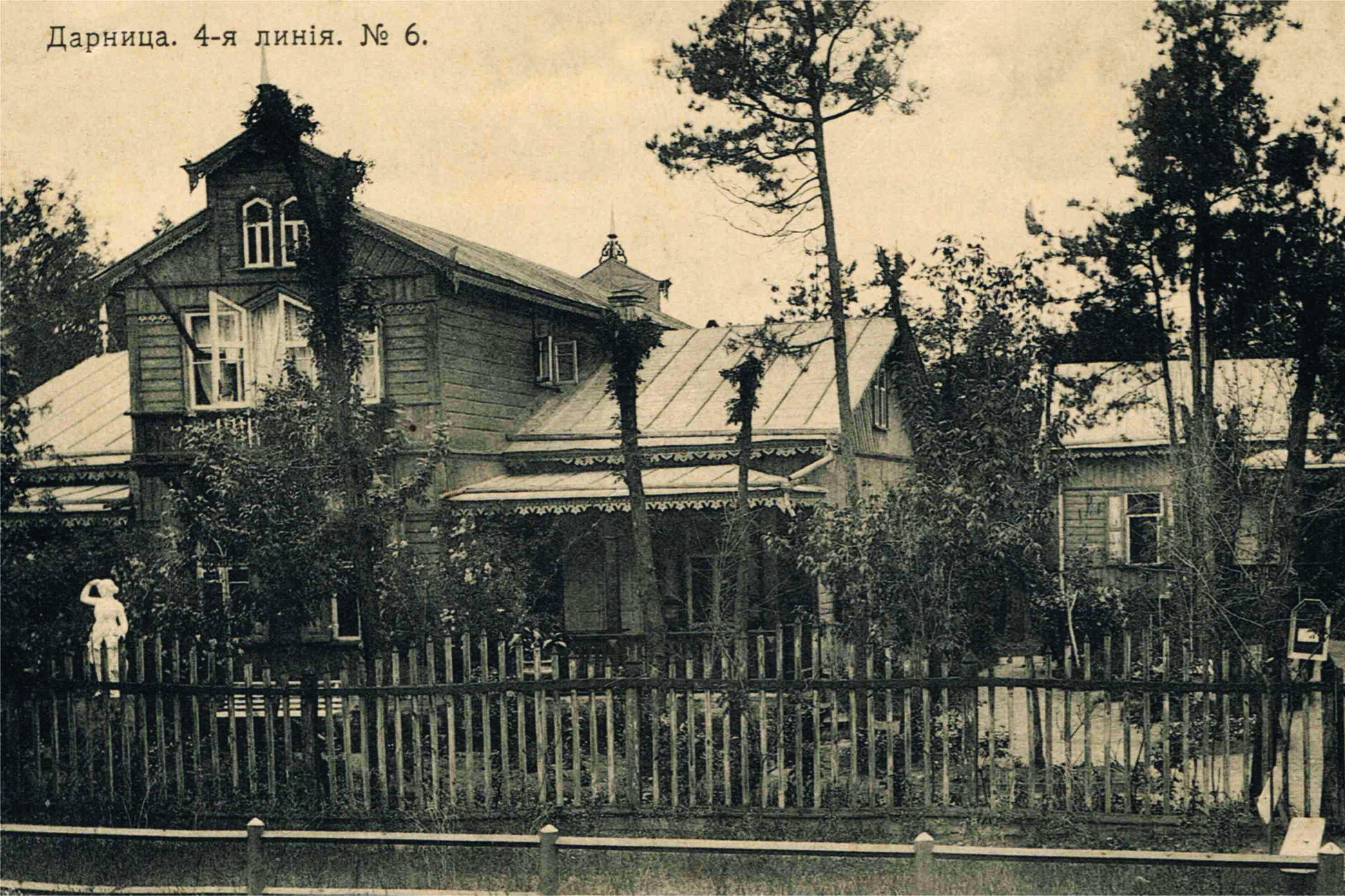 Дачний будинок на на 4-й лінії. Дарниця